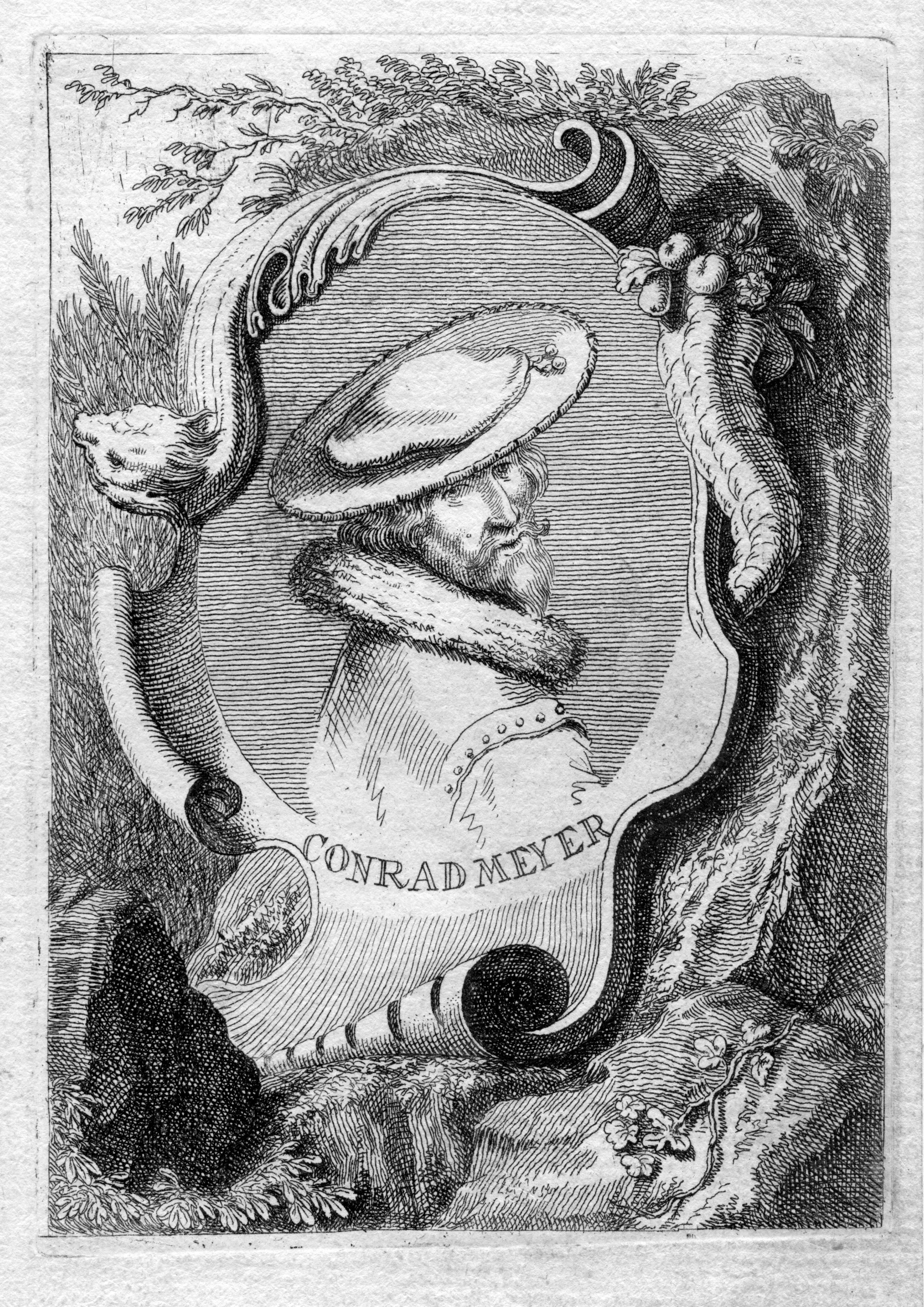 portrait gravé